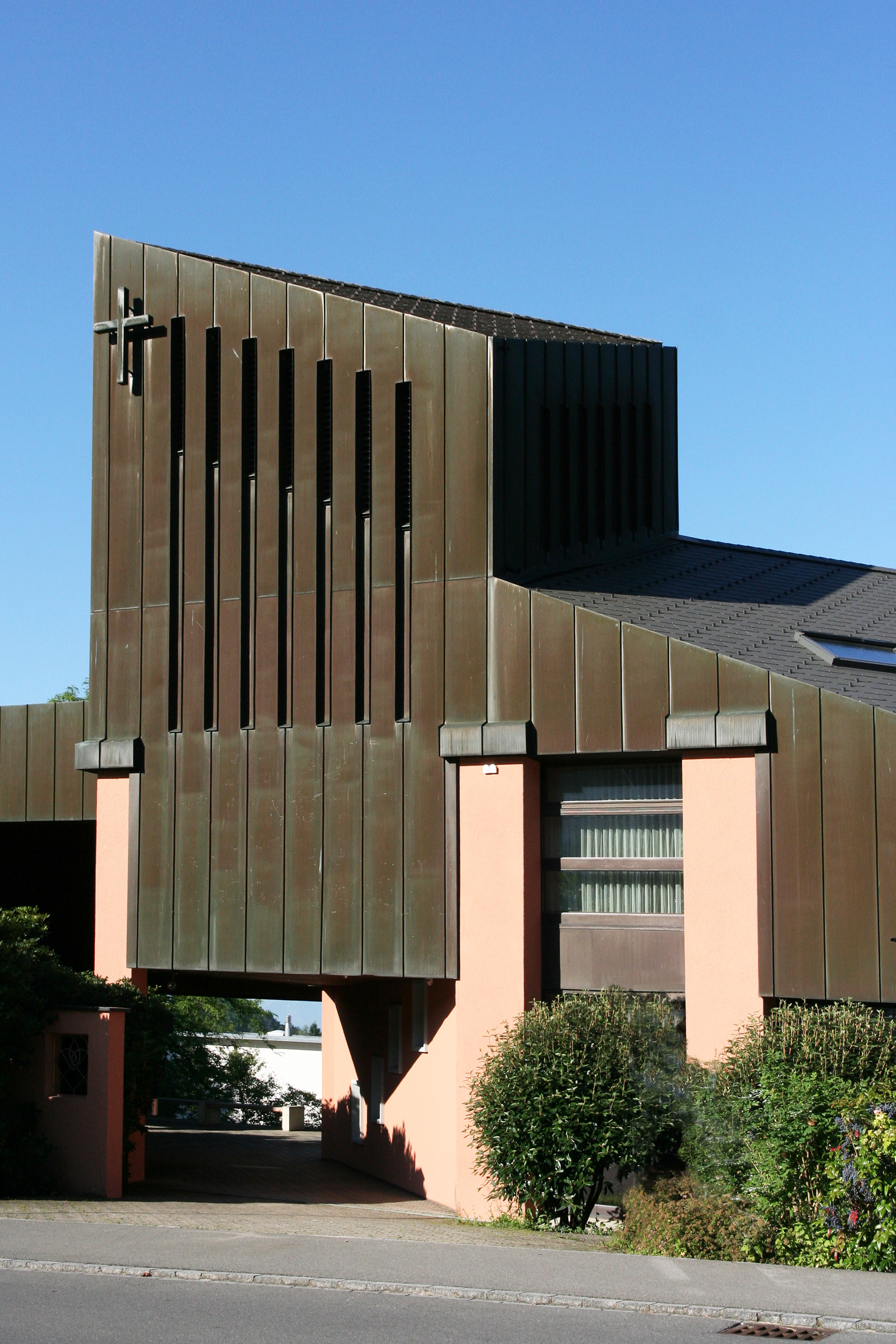 Römisch-katholische Pfarrkirche Herz Jesu Hausen am Albis, Glockenturm